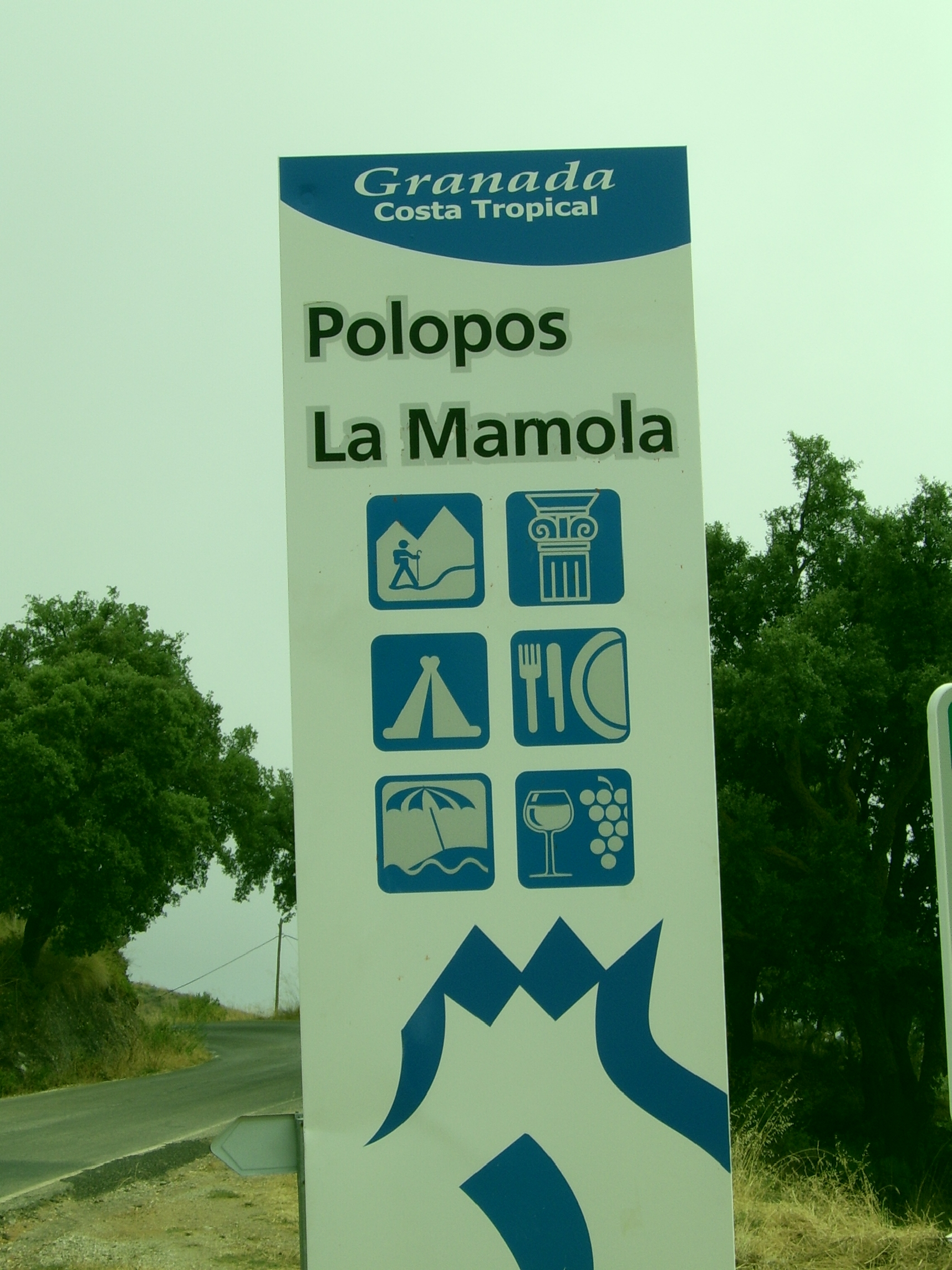 Cartel a la entrada de Polopos, en Granada (España)